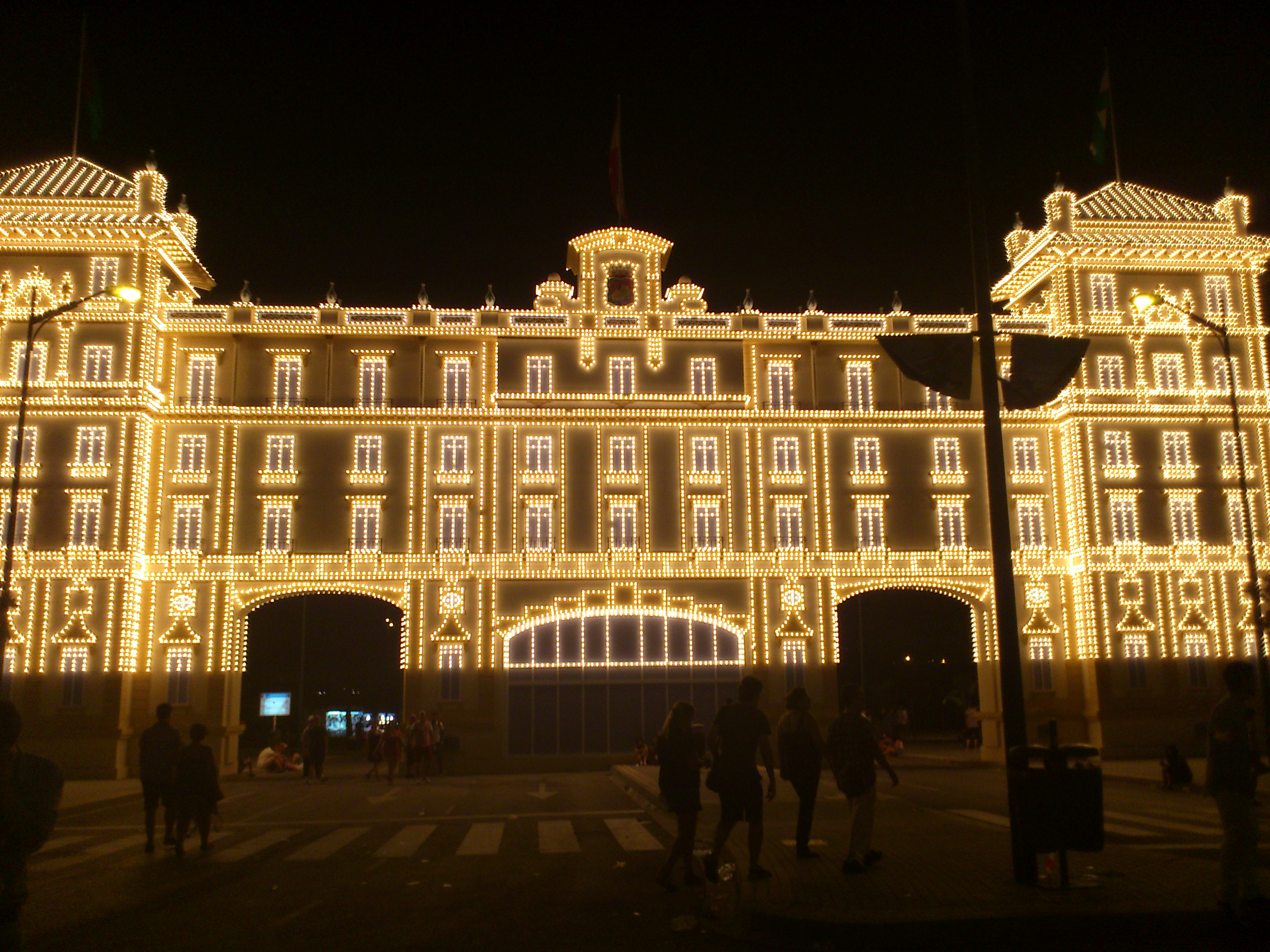 Composición de luces formando la tradicional "Portada" que se pudieron ver en la Feria de Agosto de 2012